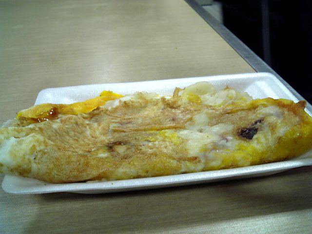 DVC00051.JPG